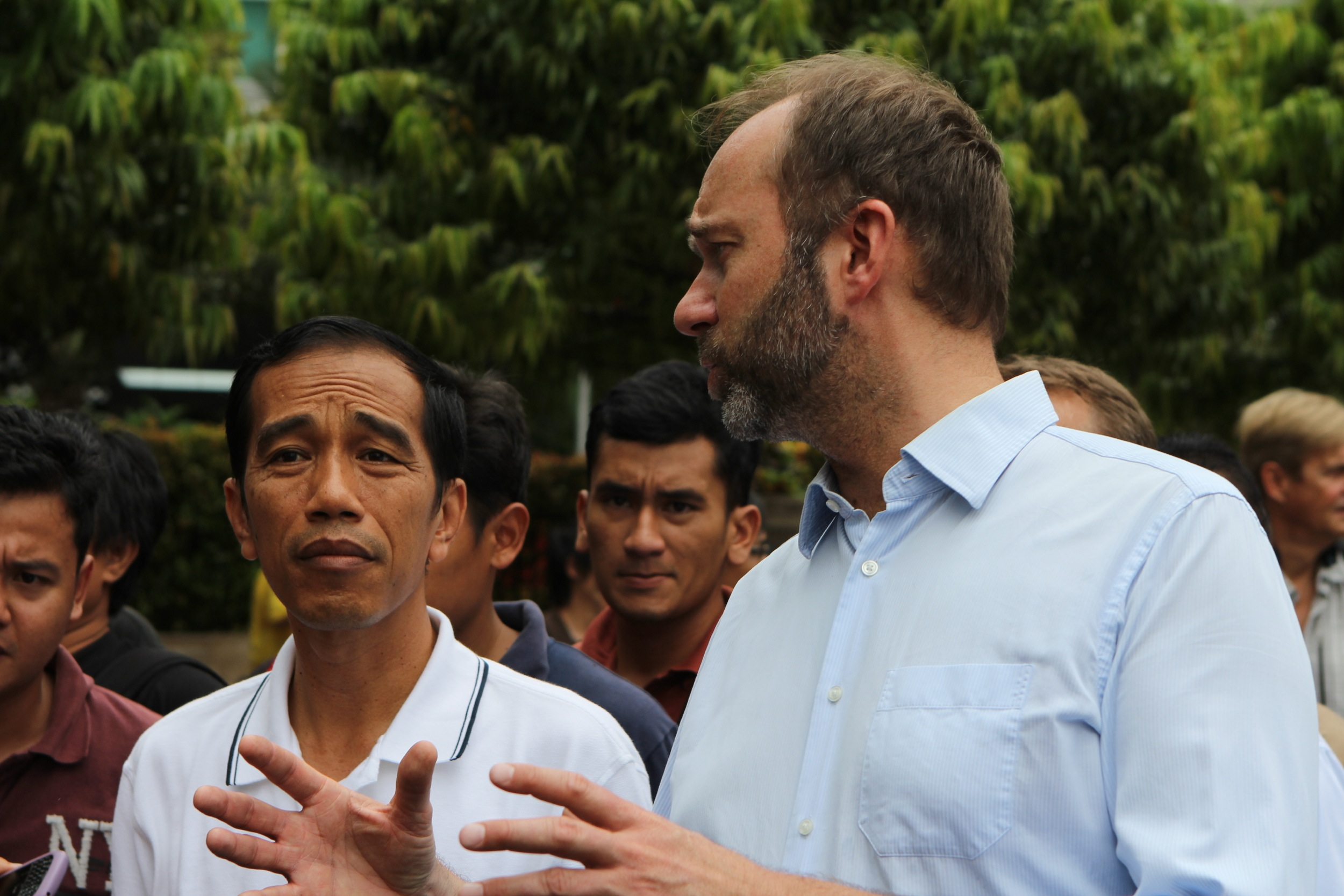 Foto: Øystein Solvang/NHD